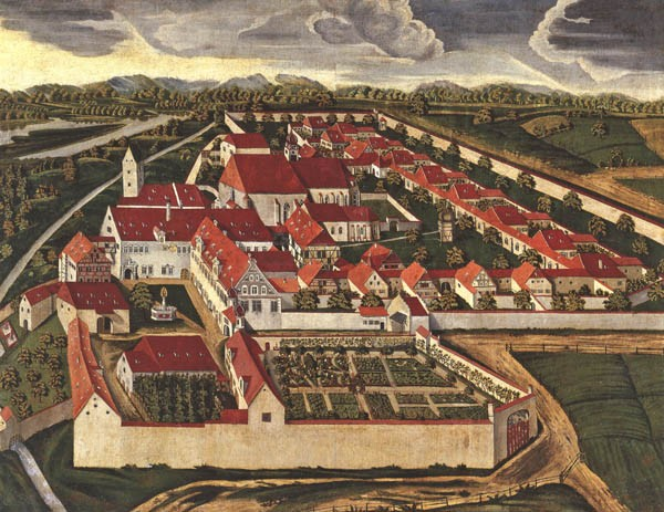 Kartause Buxheim um 1690; Gemälde in Besitz der Abtei Ottobeuren